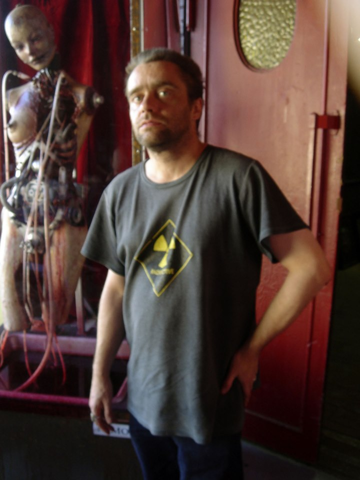 Philippe Pissier au T.O.T.E.M. (Maxéville), 2005; Photo © Gilles Berquet.